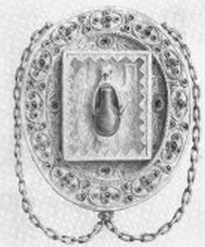 La Sainte Ampoule dans son reliquaire (gravure, 18. siècle)